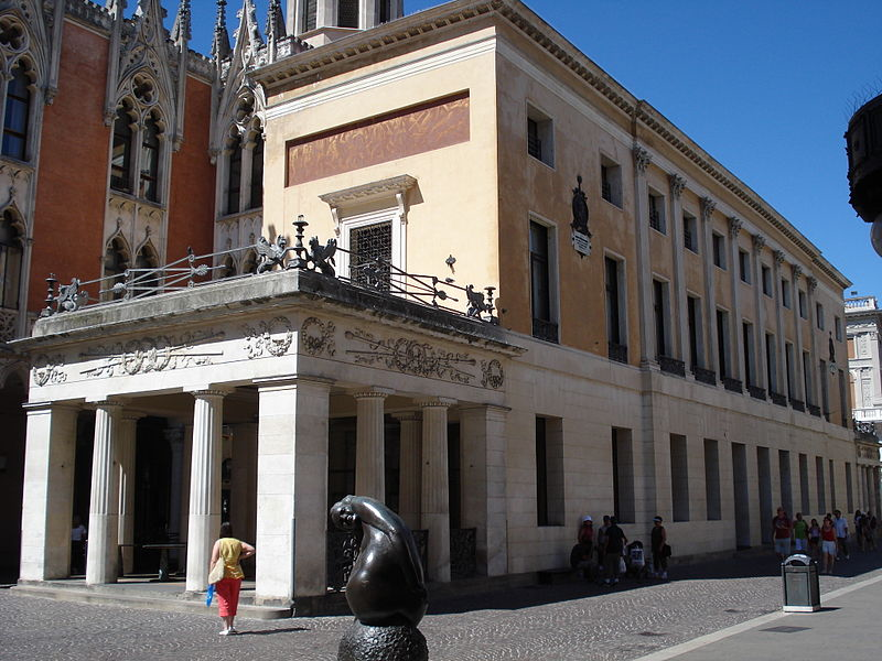 Il caffè Pedrocchi di Padova visto da sud